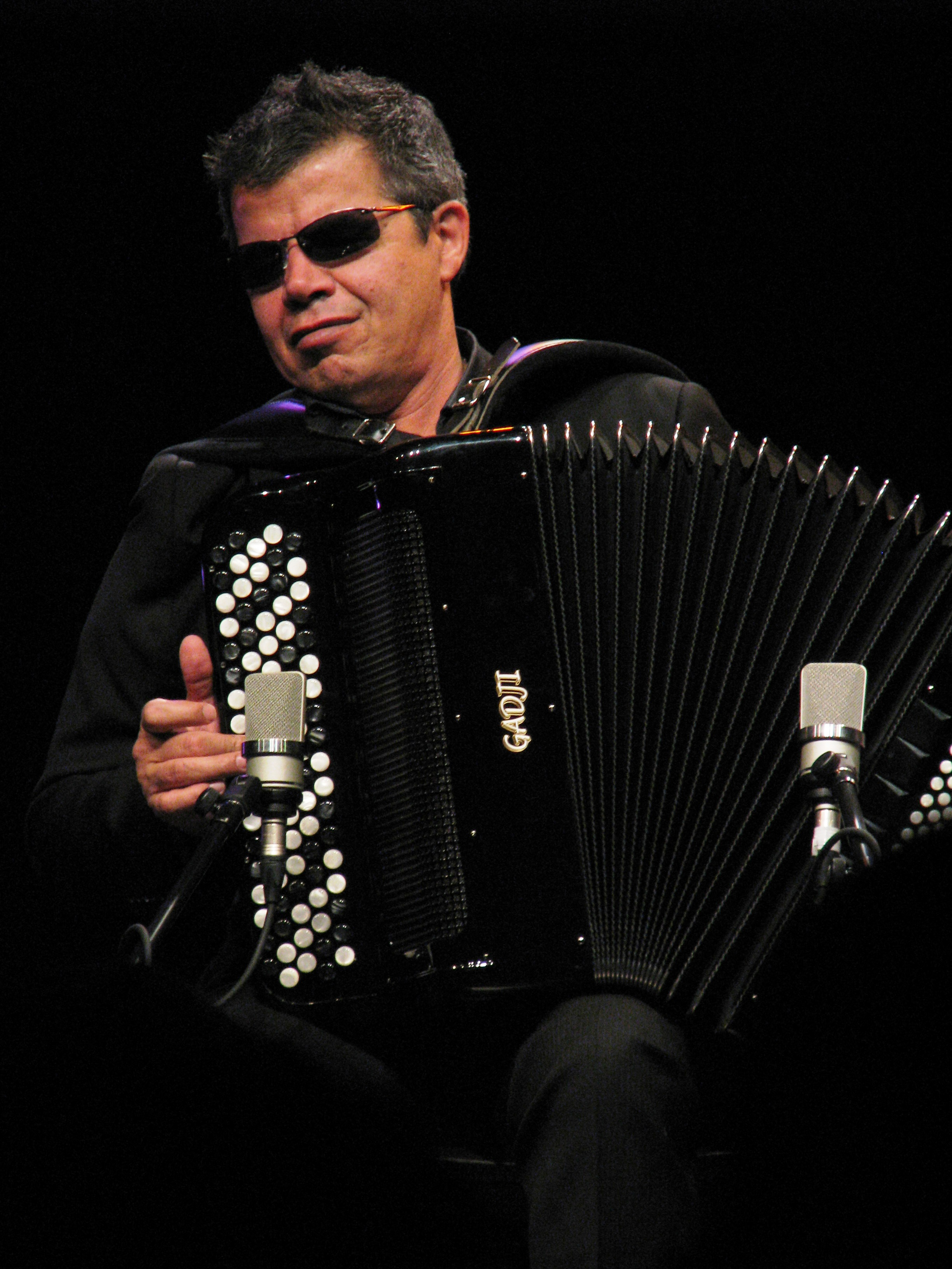 Marcel Loeffler, accordéoniste de Jazz, joue sur les accordéons Gadji